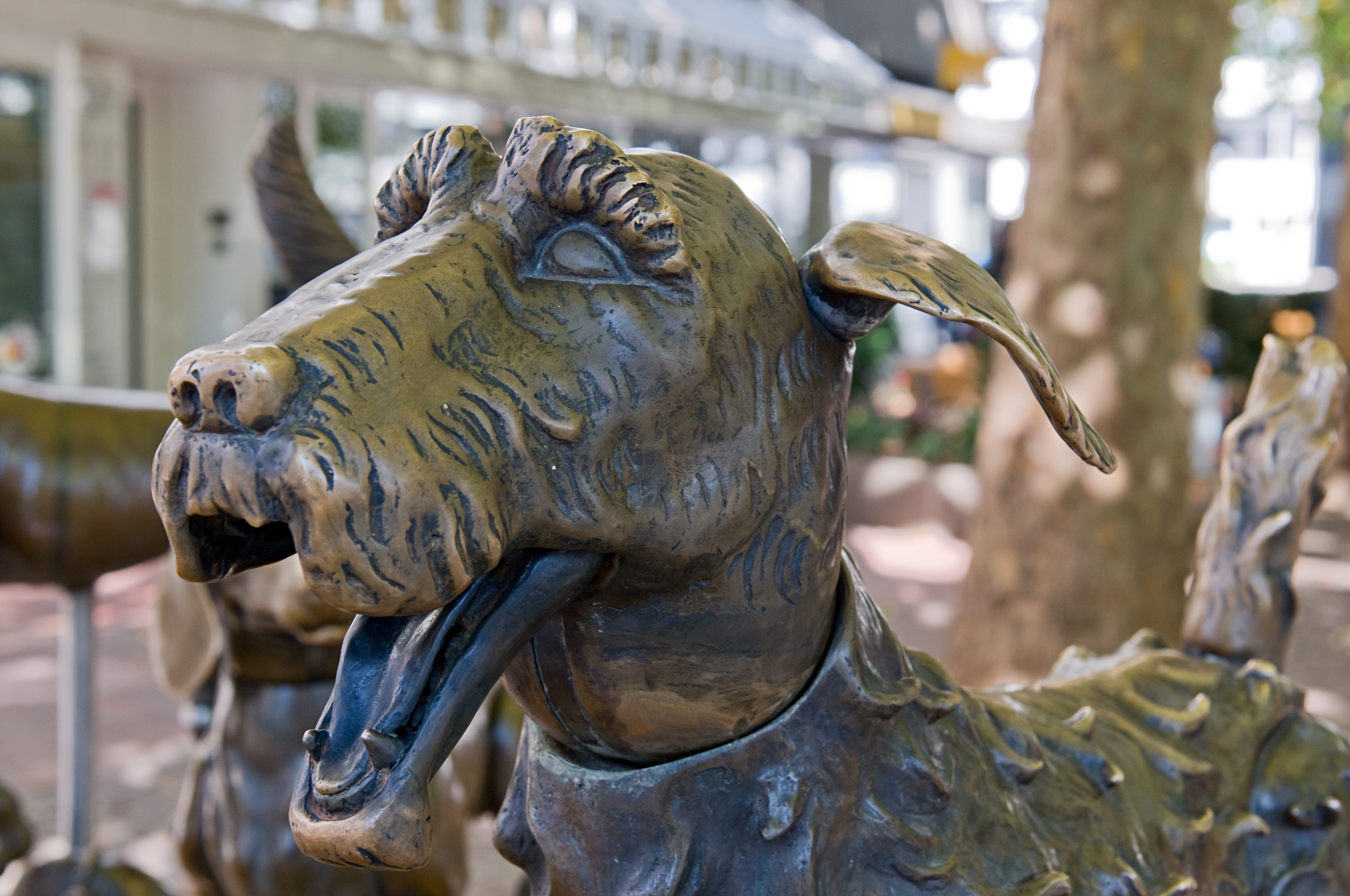 Krieh die Kränk, Offebach! Skulpturengruppe von Bonifatius Stirnberg in der Offenbacher Innenstadt, gestiftet von der Apotheke zum Löwen Detail: Schnauzer